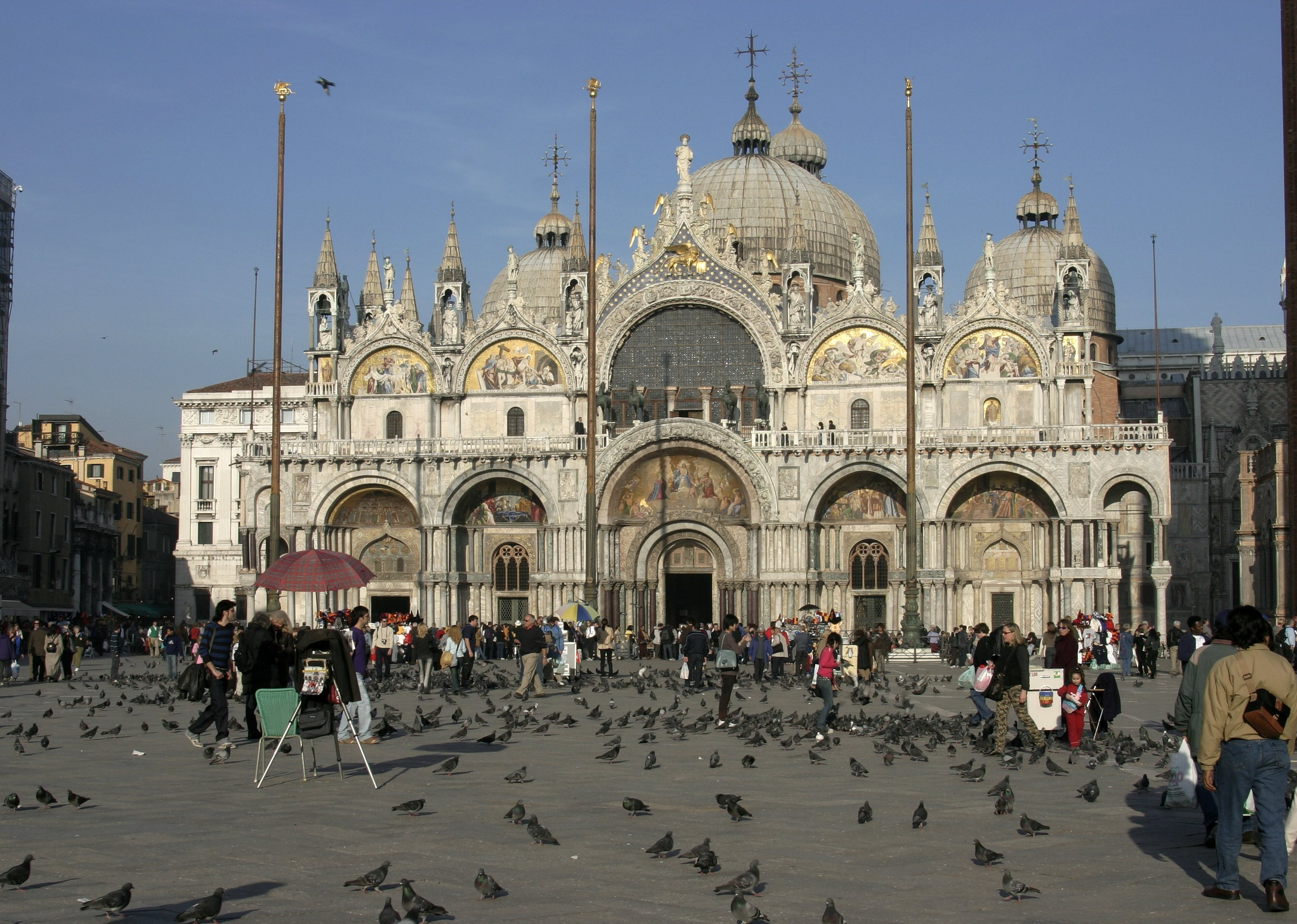 Basilica Venecia